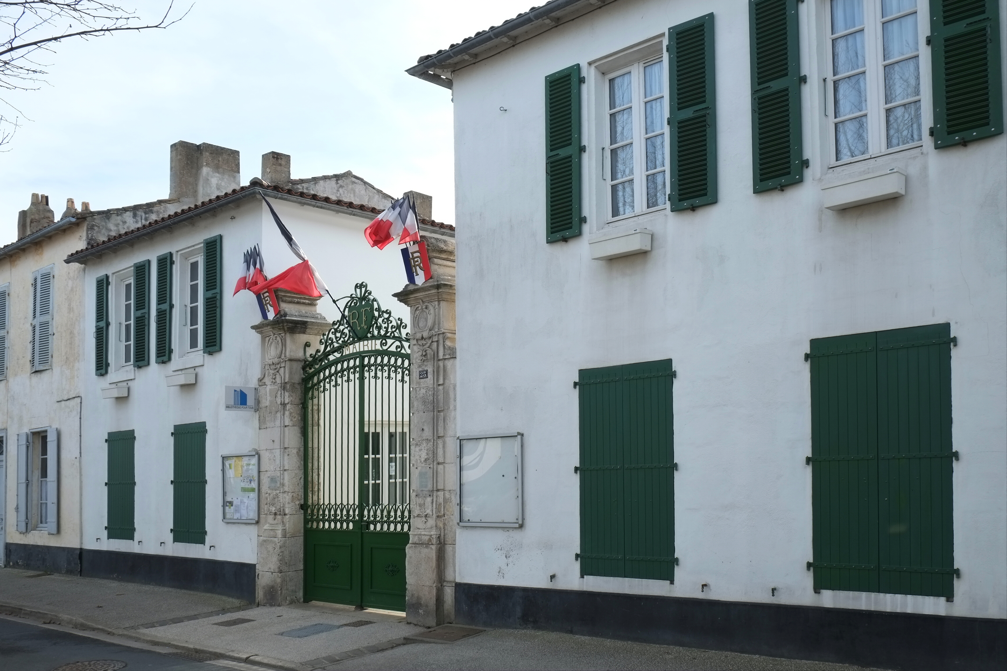 La mairie La Flotte Île de Ré Charente-Maritime France